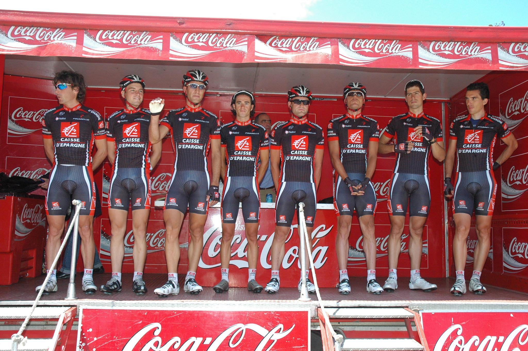 Caisse d'Epargne, Euskal Bizikleta 2008